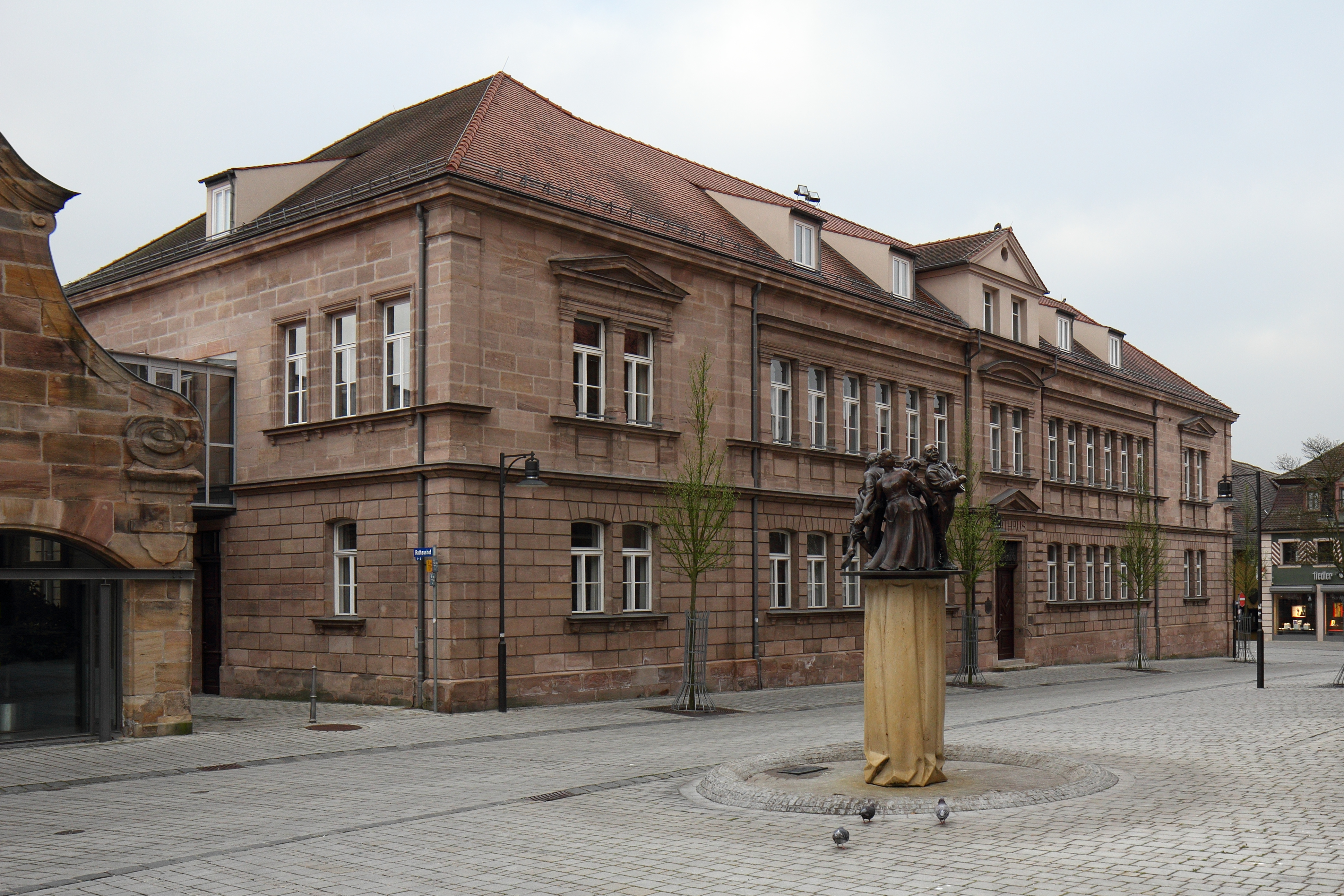 Roth - Kirchplatz 2 - Ehem. Schulhaus. Ausgedehnter zweigeschossiger Sandsteinquaderbau, Neurenaissance, 1878/80, 1902/04 umgebaut; mit Ausstattung.